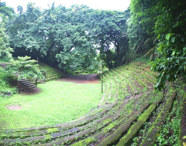 livre de la jungle